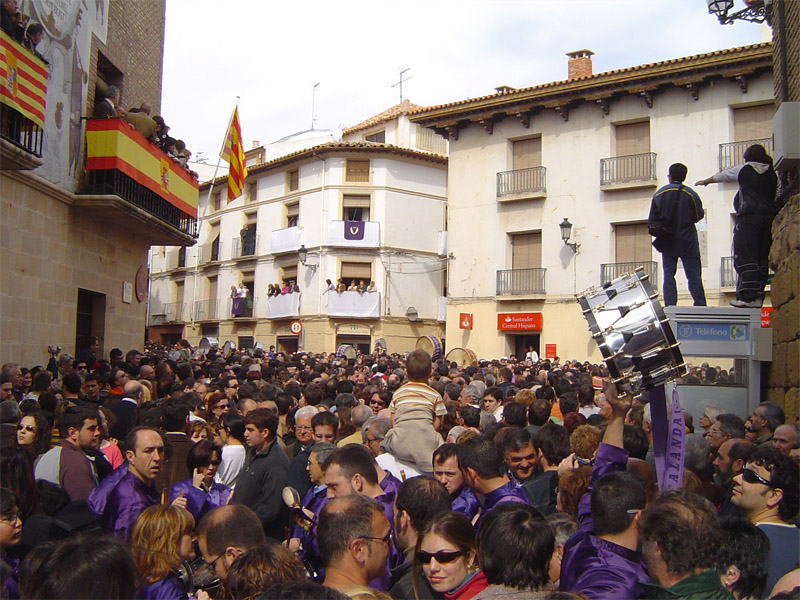 Que tiempos... y lo bien que imitabamos los tambores. Semana Santa del 2005